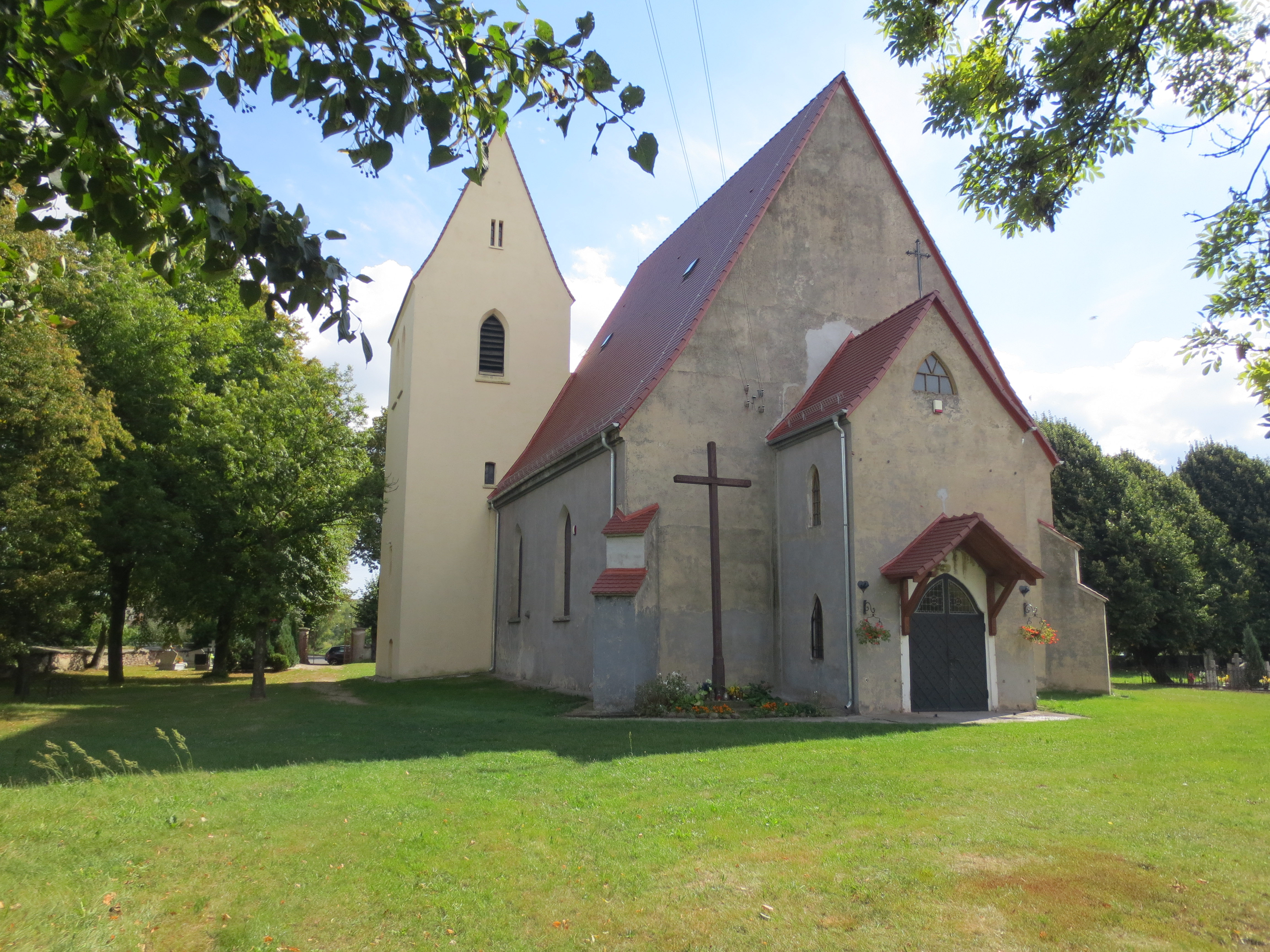 Kirche in Niedźwiedzice bei Legnicka (bis 1945: Bärsdorf bei Liegnitz)